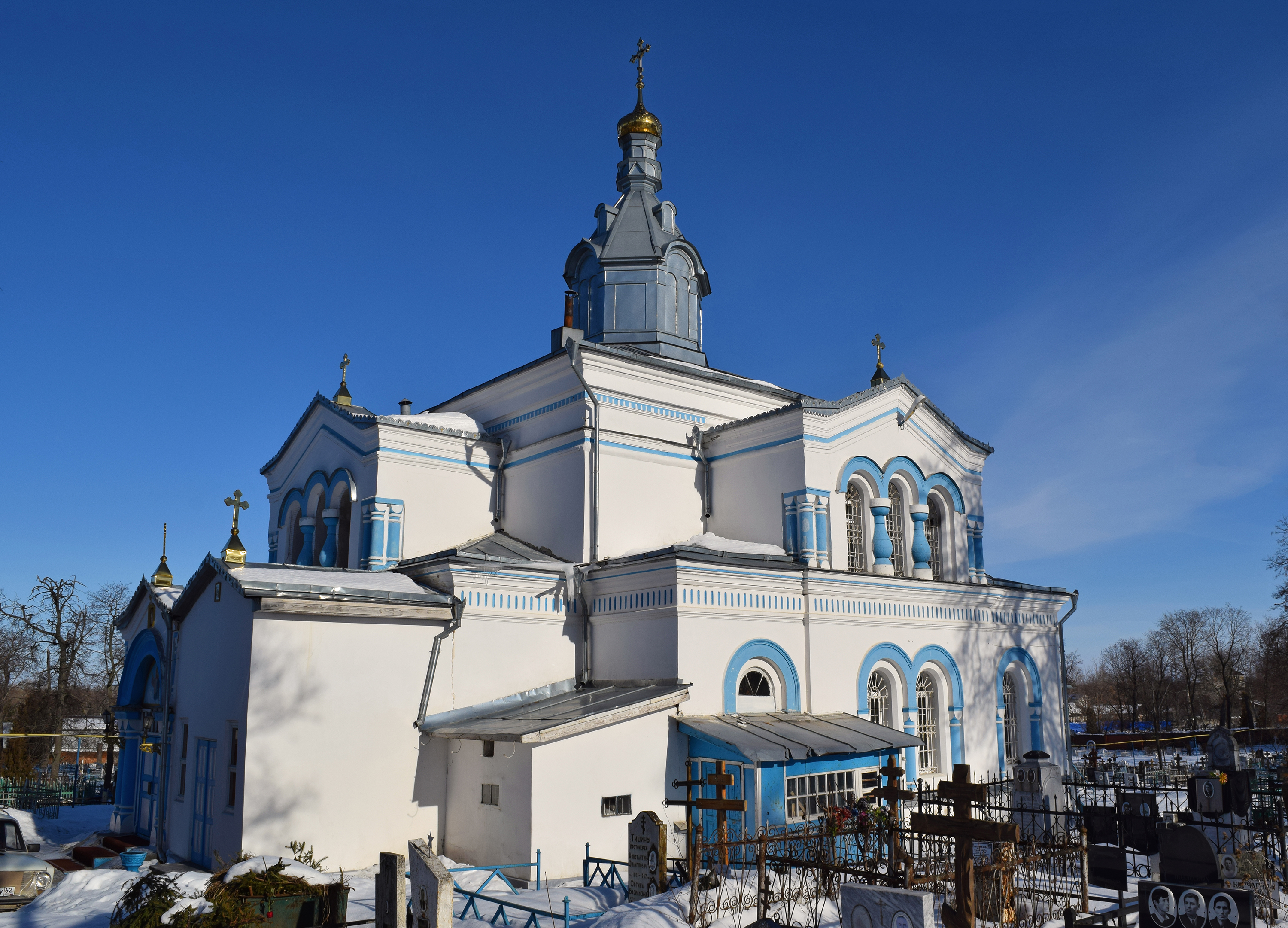 Храм построен в 1870-1872 гг. Памятник архитектуры.